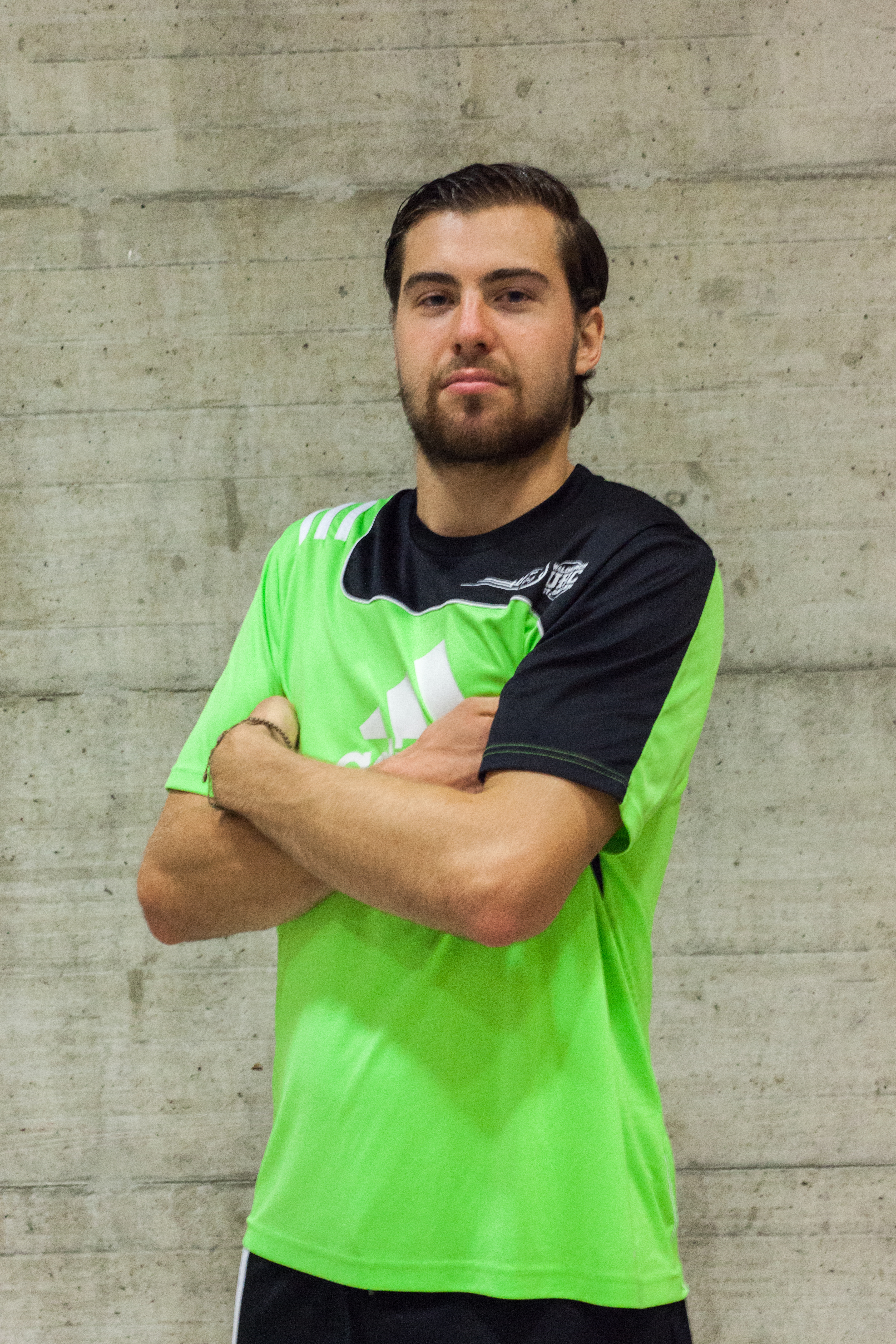 Manuel Rüegg, Spieler UHC Waldkirch-St. Gallen Saison 2014/15